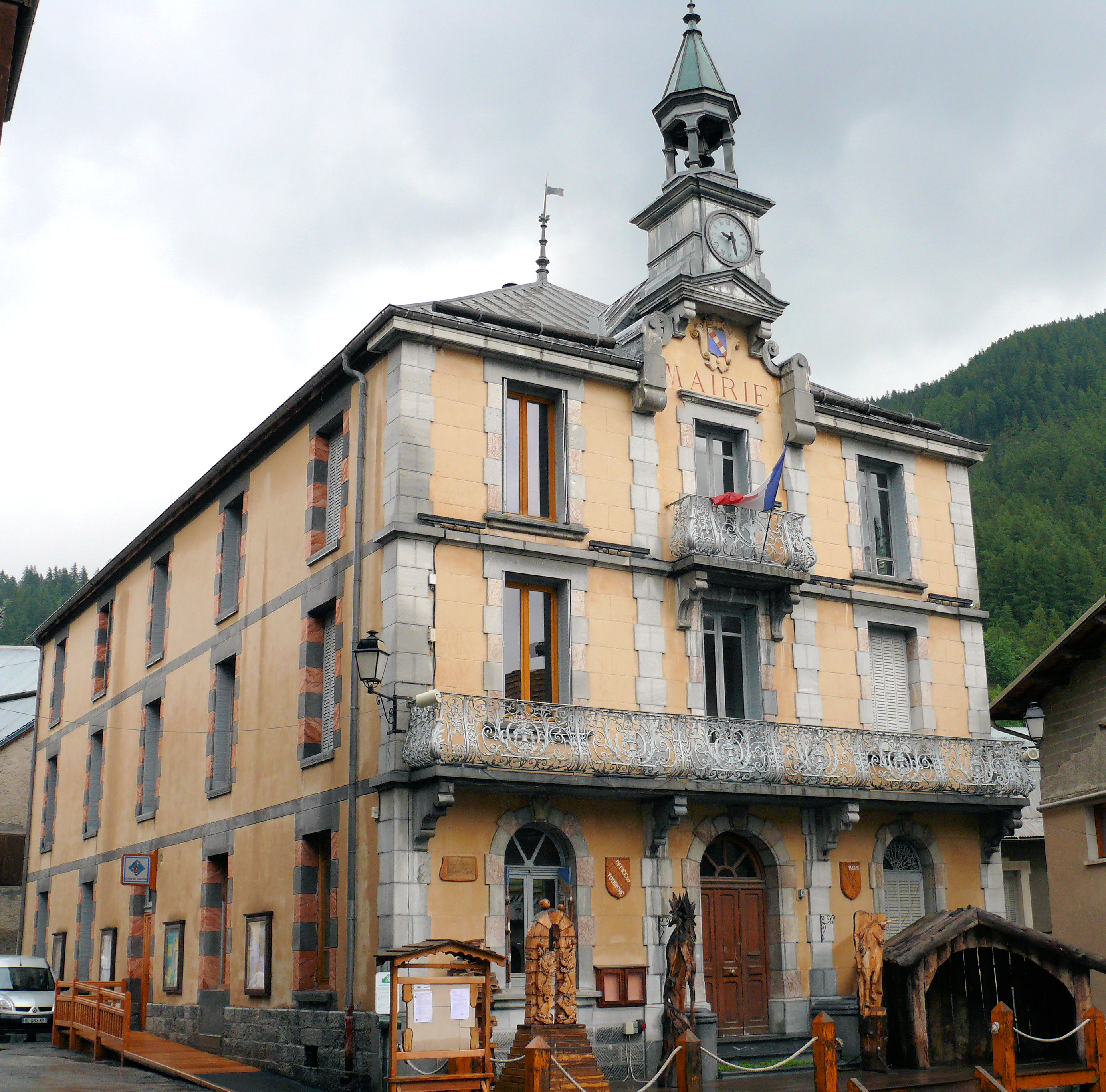 Aiguilles - Mairie